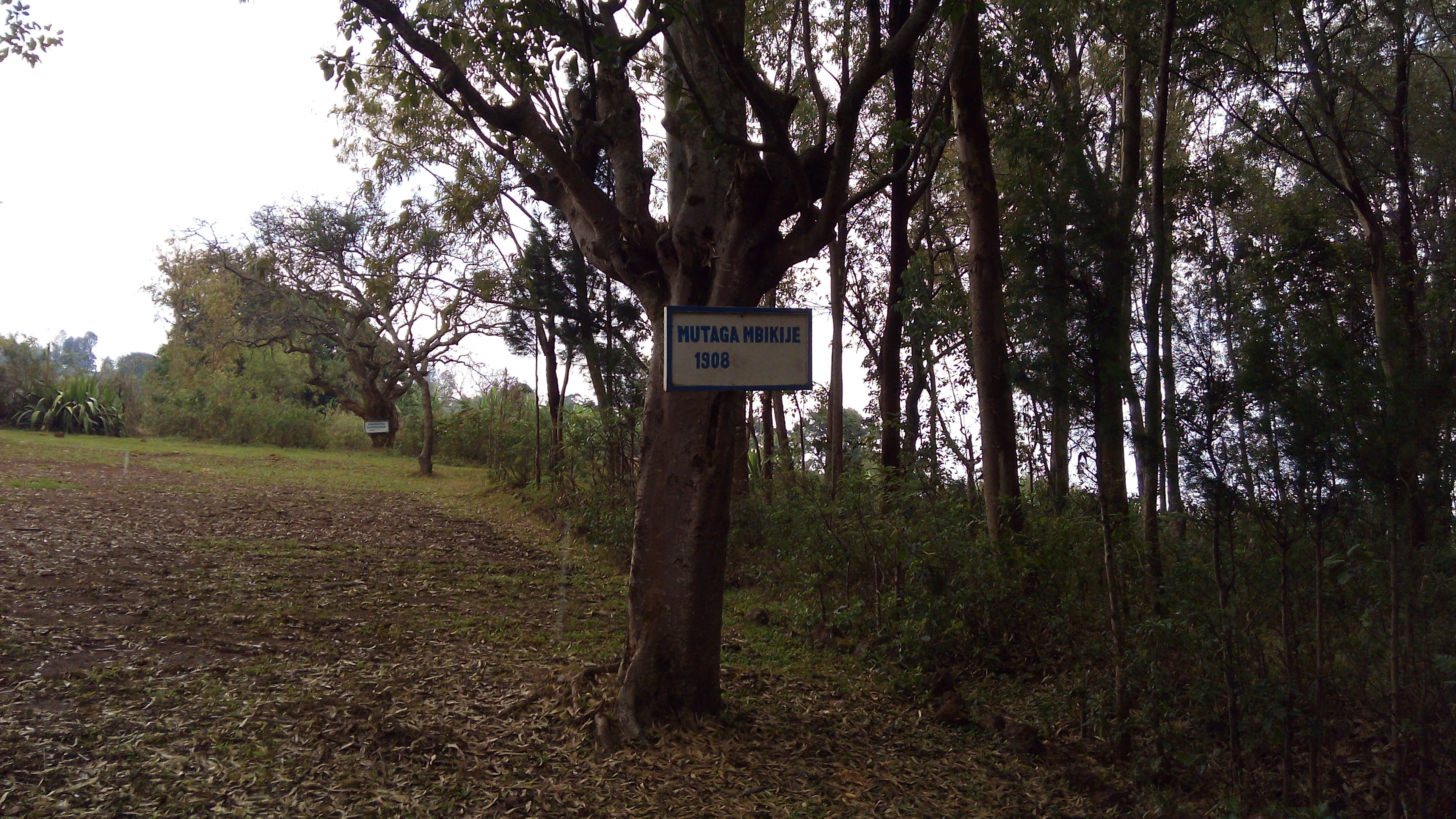 Lors de l'intronisation du roi, le nouveau roi plantait un arbre appelé ikigabiro This is an image from Burundi